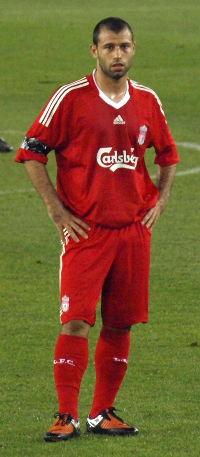 Javier Mascherano con la camiseta del Liverpool en el partido de presentación del Estadio de Cornella-El Prat disputado ante el RCD Español de Barcelona.